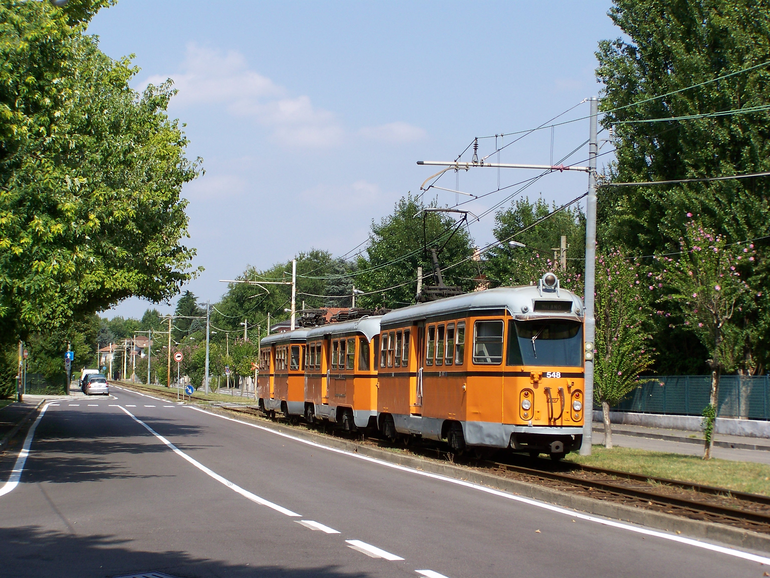 L'interurbano Bloccato 547+511+548 mentre transita in viale Roma a Cusano lungo il tracciato in sede propria che caratterizza i quartieri settentrionali del comune milanese.